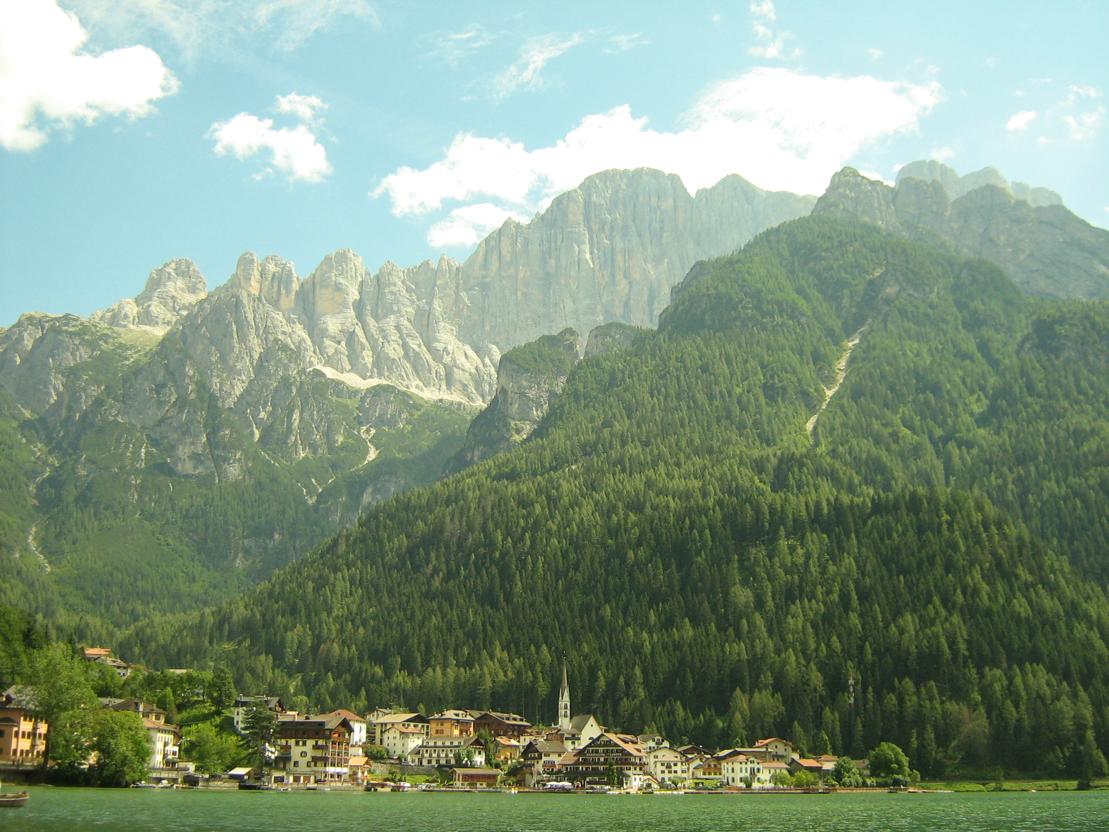 Alleghe con il Monte Civetta di sfondo